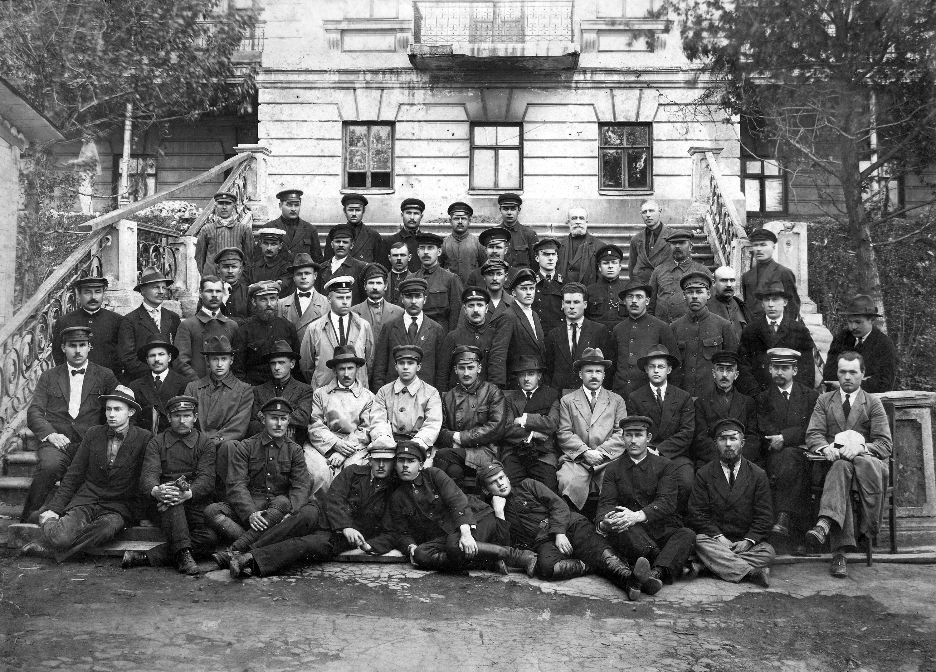 Сотрудники Дальрыбы. Второй слева во втором ряду — В. К. Арсеньев, справа от него — управляющий Дальрыбой Т. М. Борисов